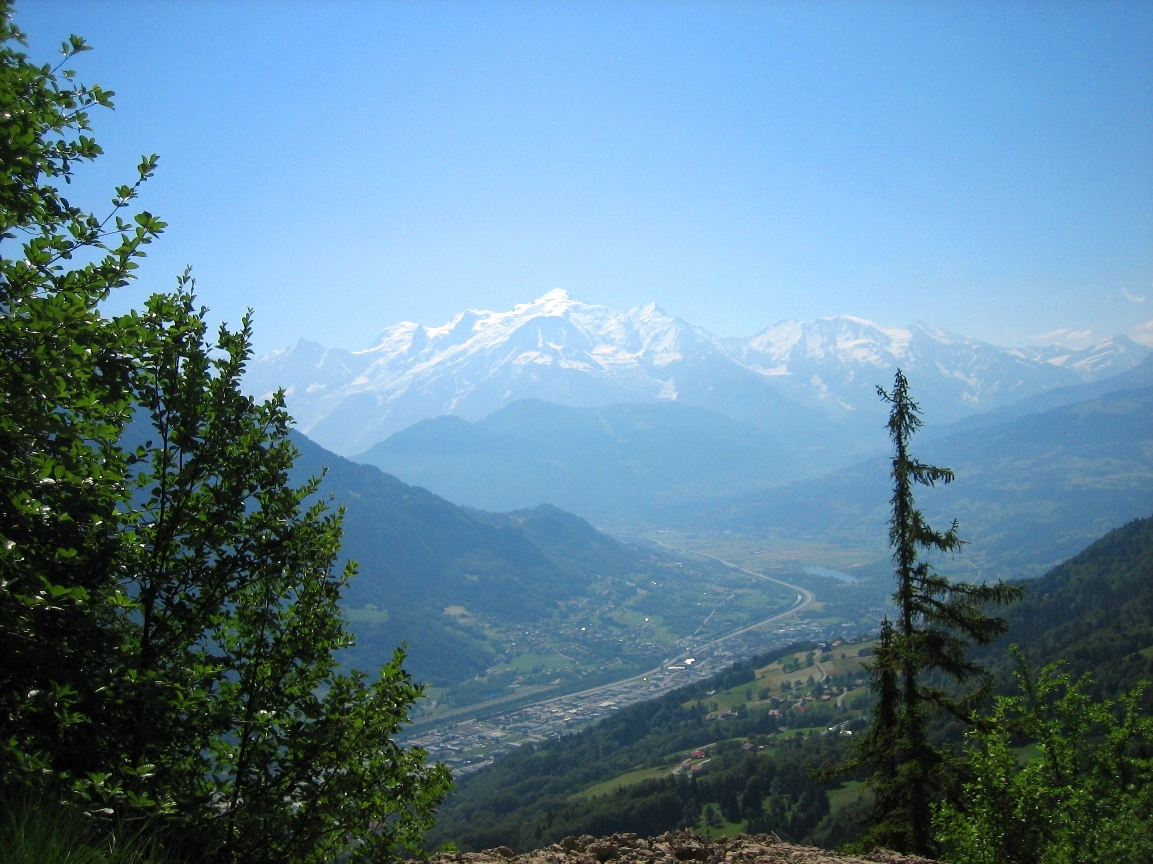 Mont Blanc depuis Doran (chaine des Aravis, au-dessus de Sallanches)